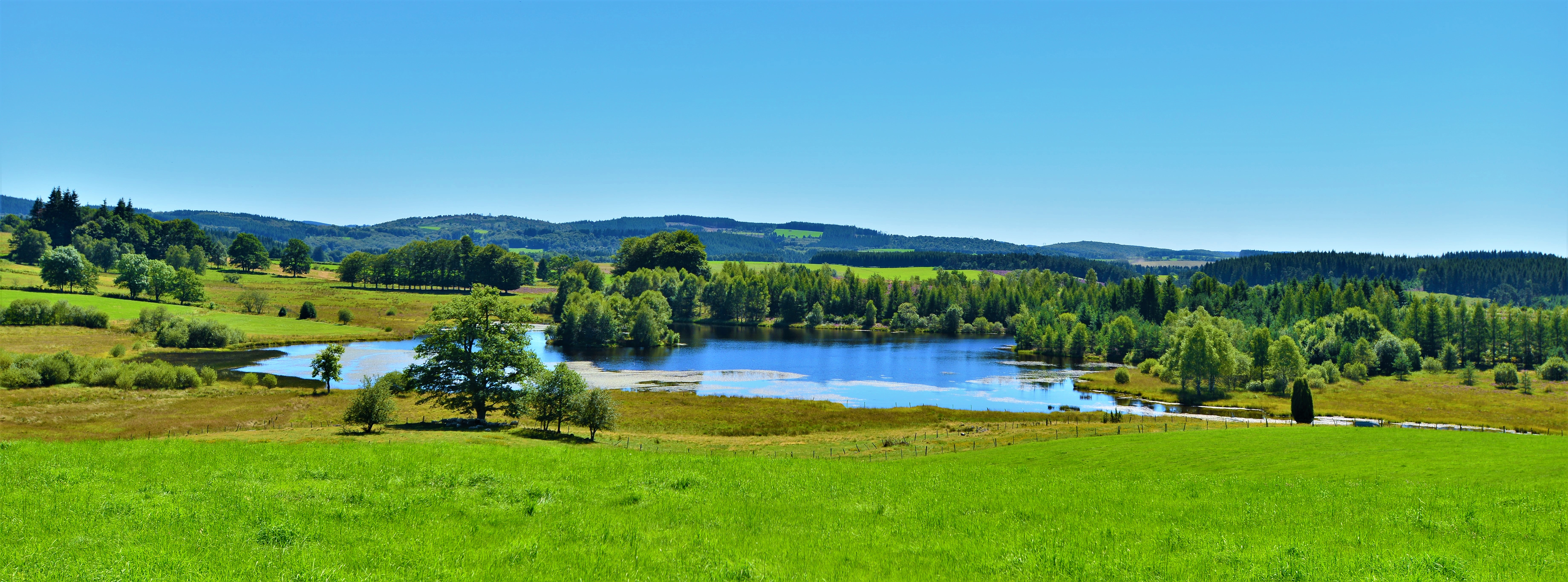 L'étang de Chabannes entre Tarnac et Saint Merd-les-Oussines, plateau de Millevaches, Corrèze, France.